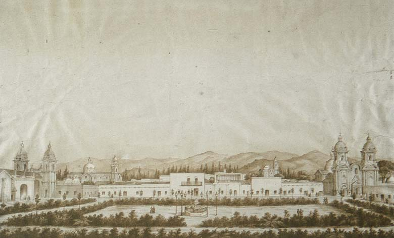 Vista de la ciudad de Mendoza, tomada desde el cabildo